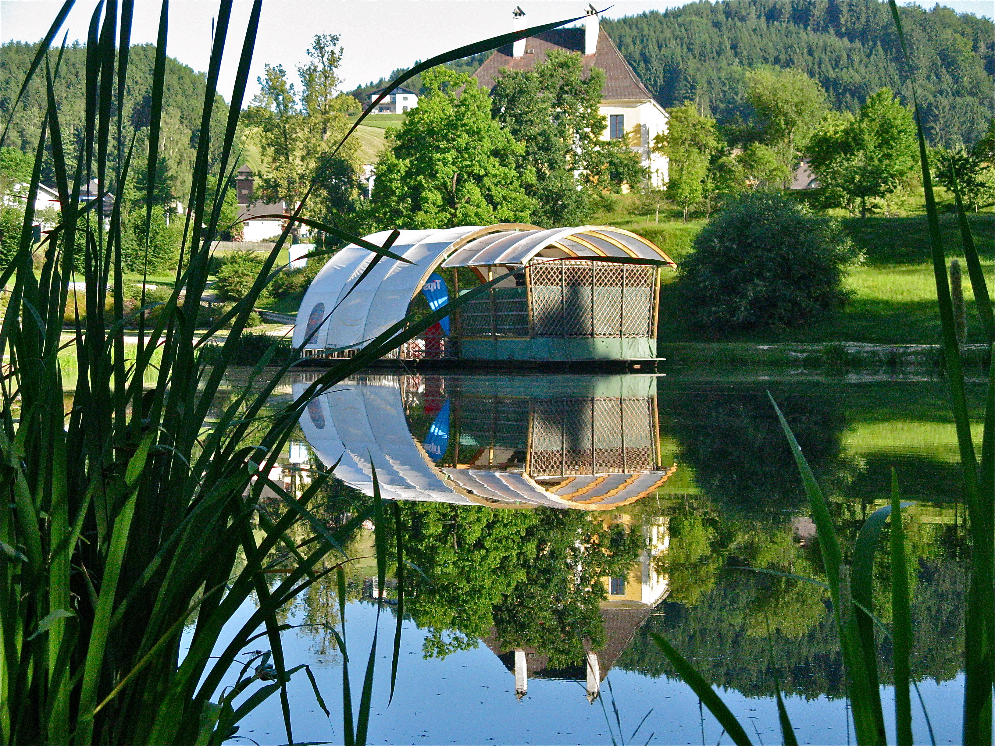 Seebühne Silva Waldhausen, wo jährlich die einzigen oberösterreichischen Seefestspiele auf der kleinsten österreichischen Seebühne stattfinden.